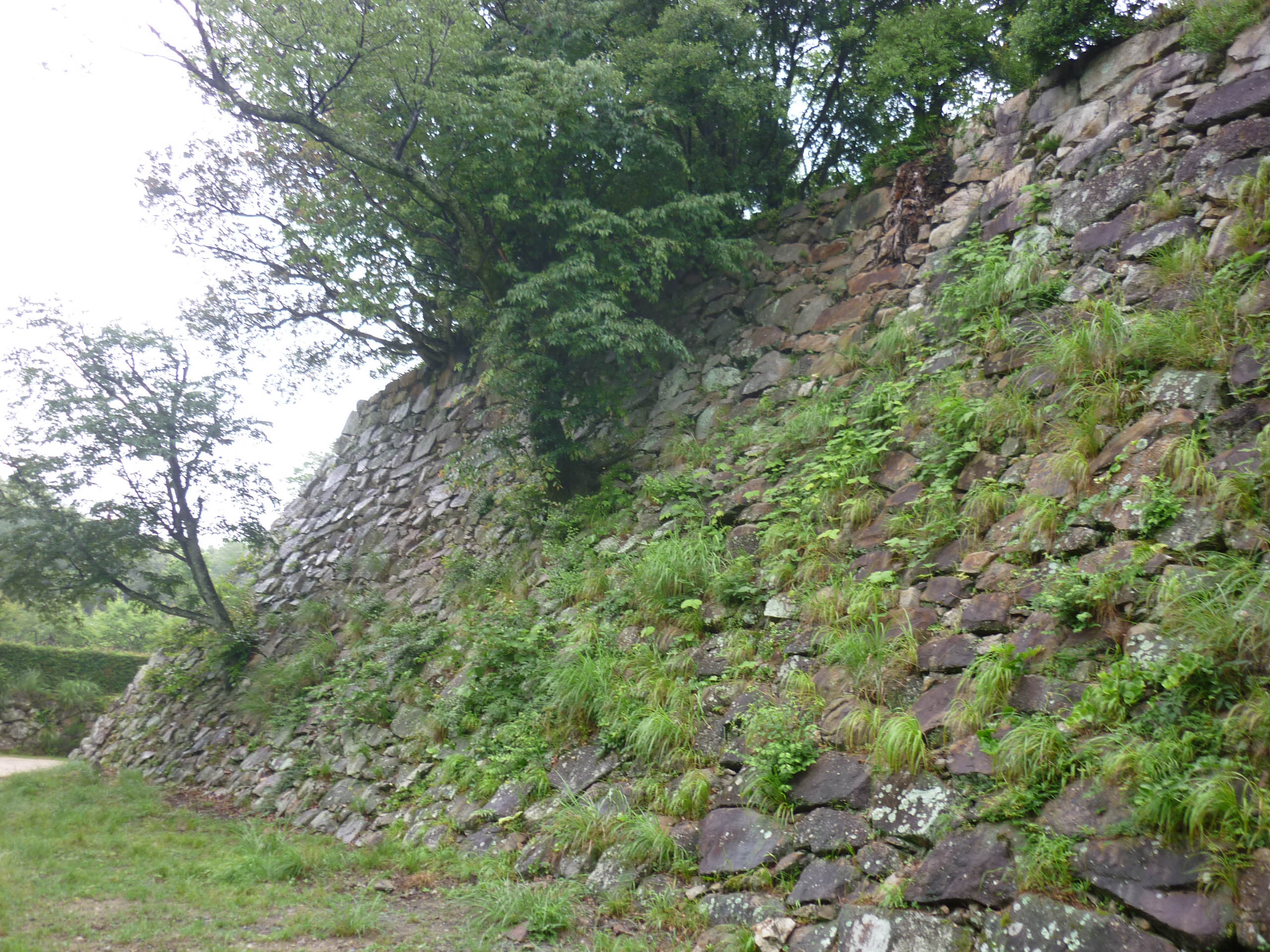 本丸台南面の石垣